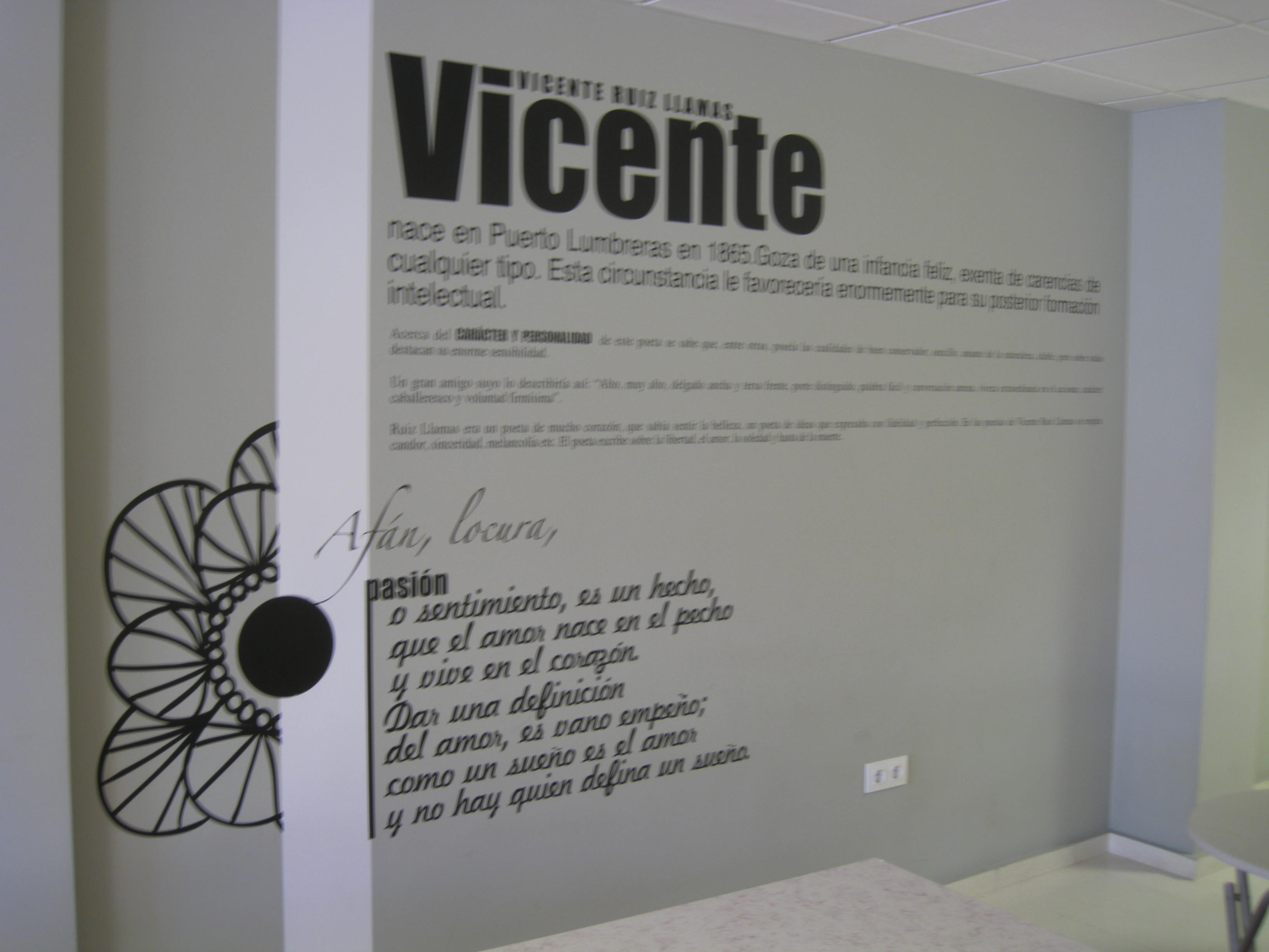 Centro Cultural dedicado a la 3ª Edad en Puerto Lumbreras, Región de Murcia (España)